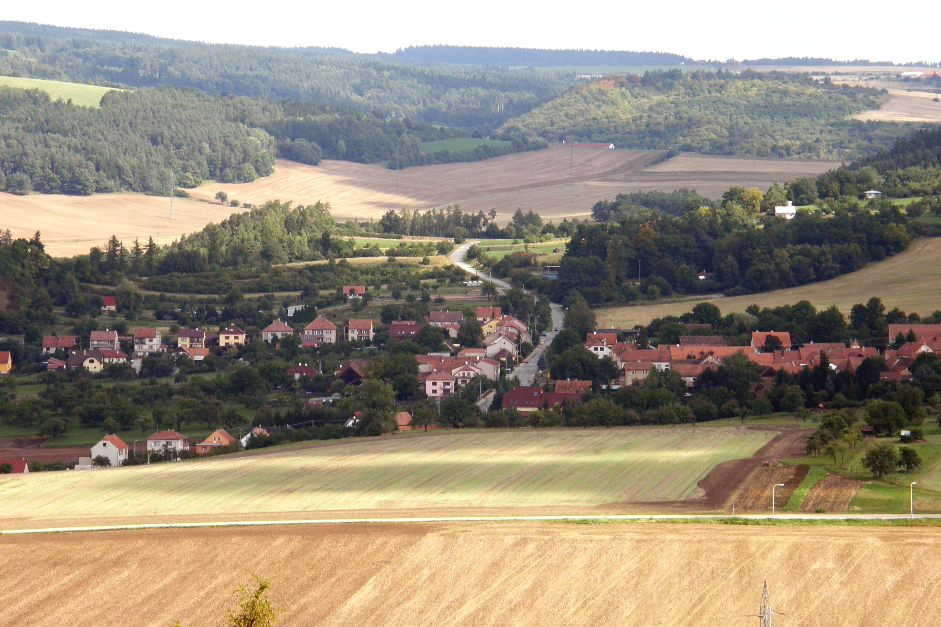 Obec Železné z Klucaniny